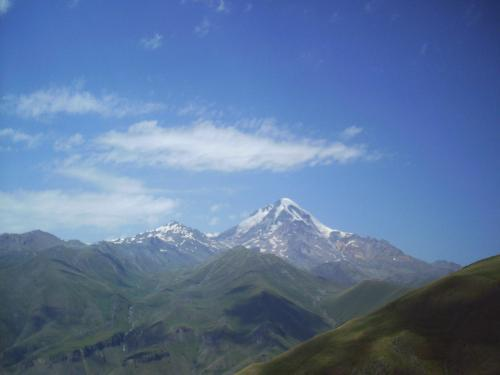 Montagnes du Grand Caucase